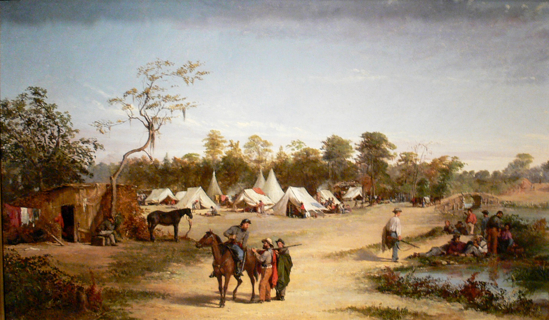 Wise's Brigade